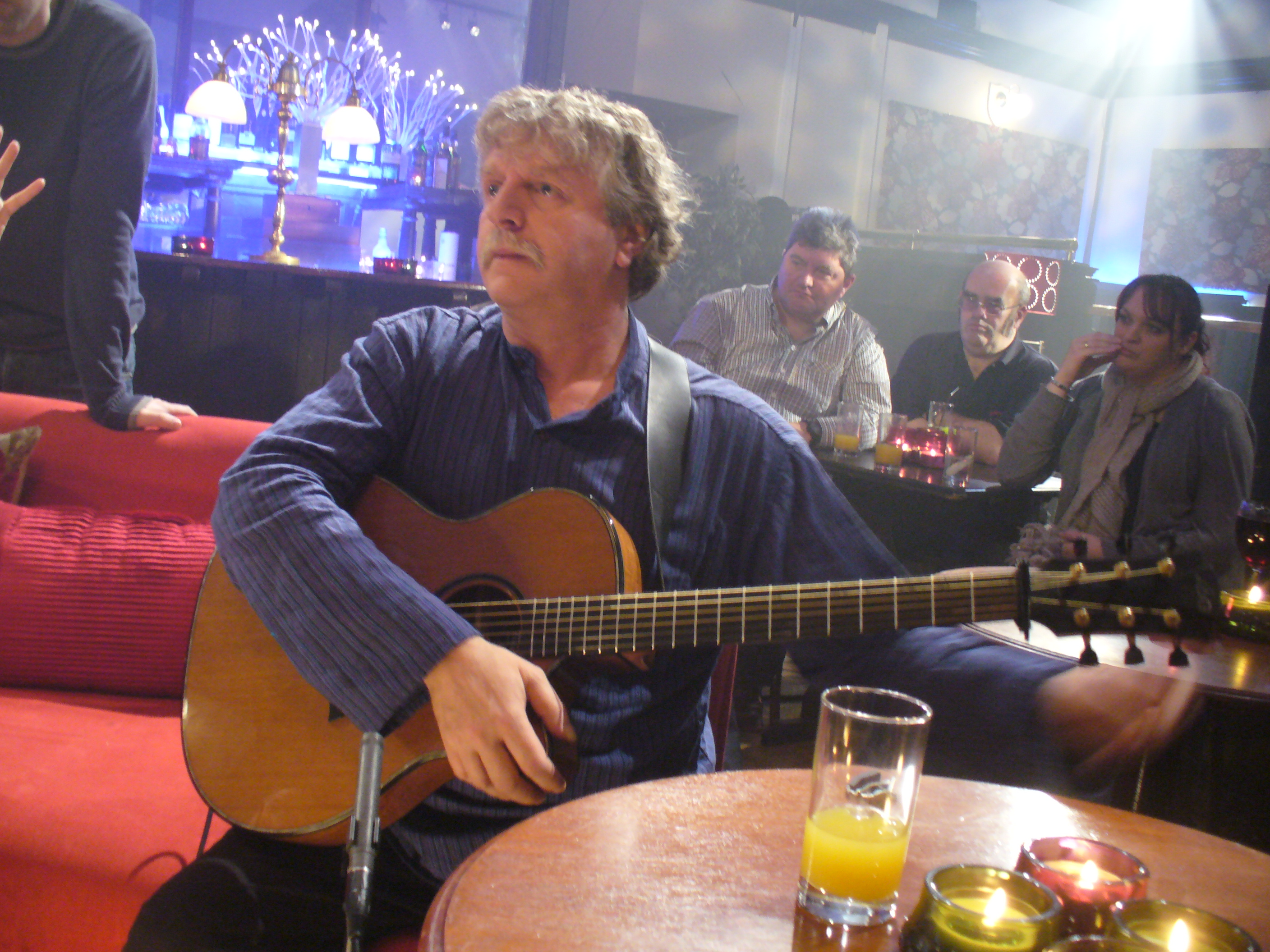 Gilles Le Bigot lors de l'enregistrement d'une émission sur la chaine de télévision écossaise BBC Alba pour "Empreintes" en 2012.